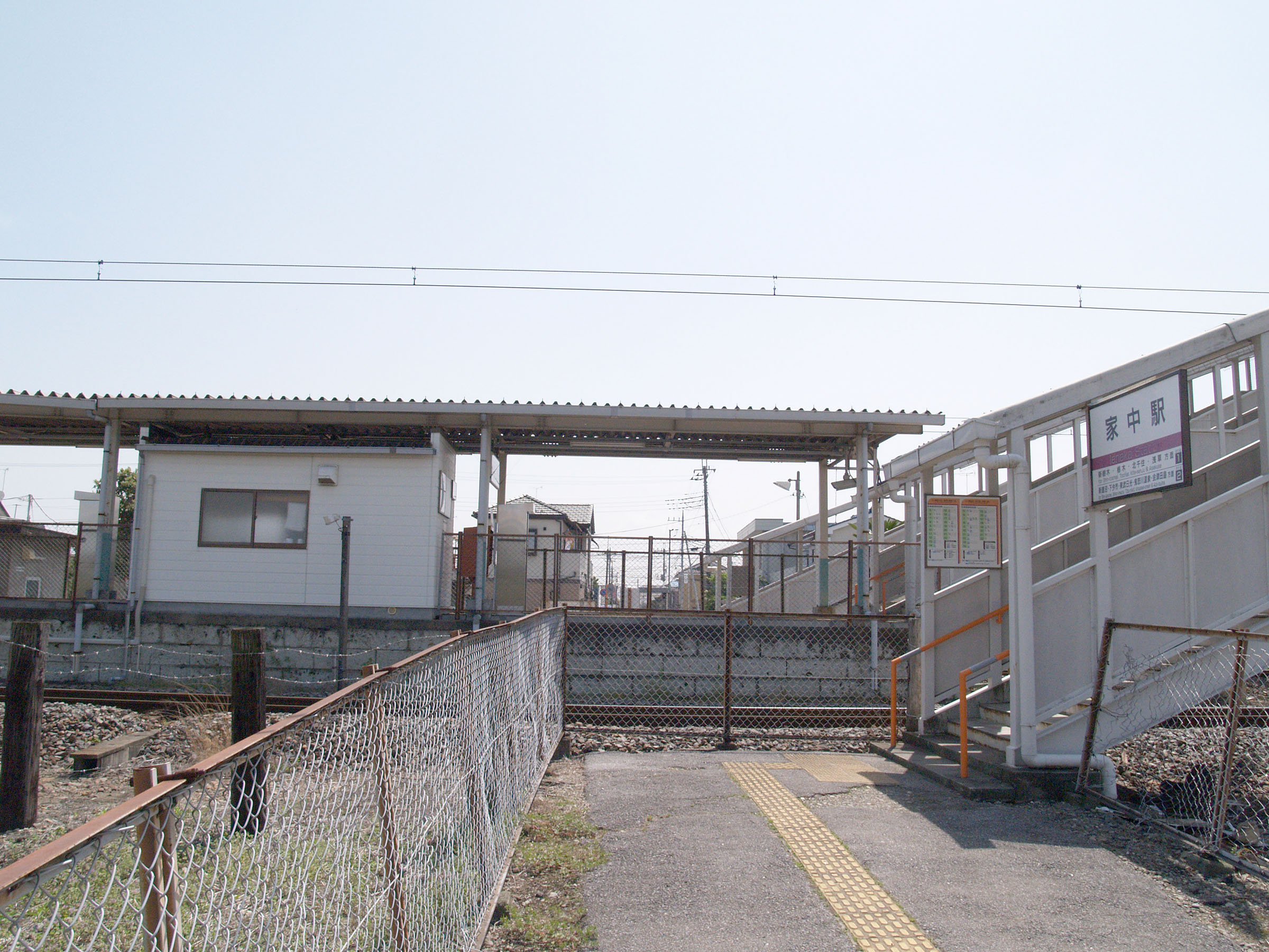 家中駅西口